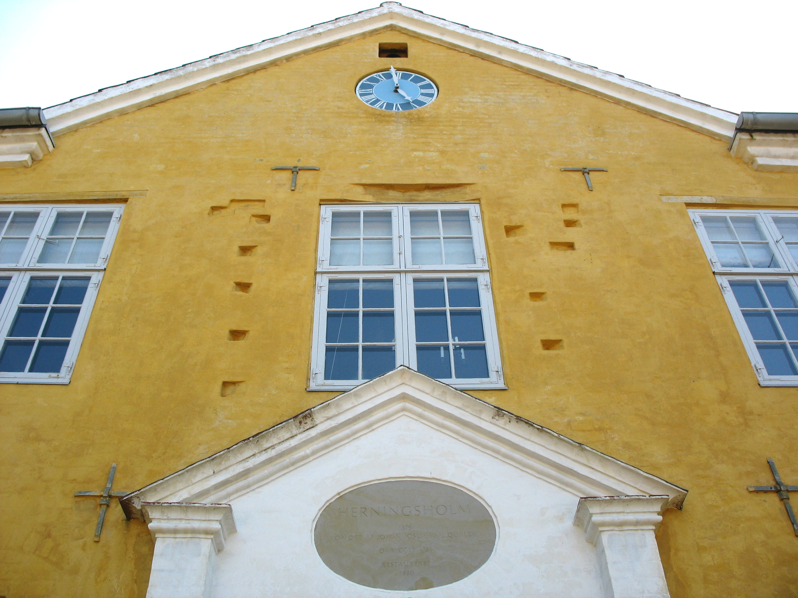 Herningsholm herregård